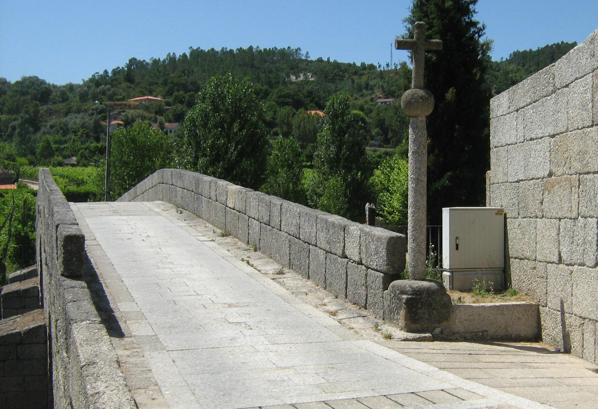 cruzeiro de aboadela